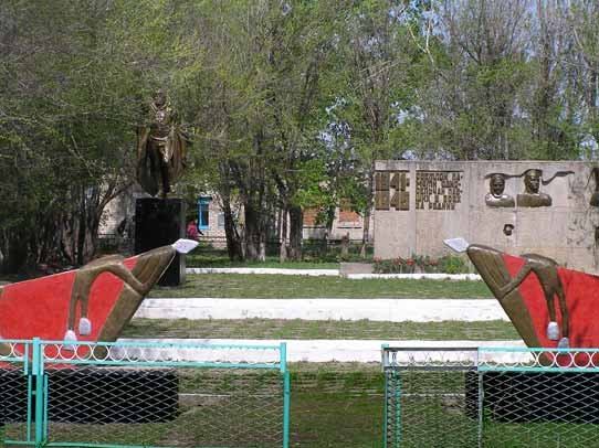 Памятник в селе Комориха